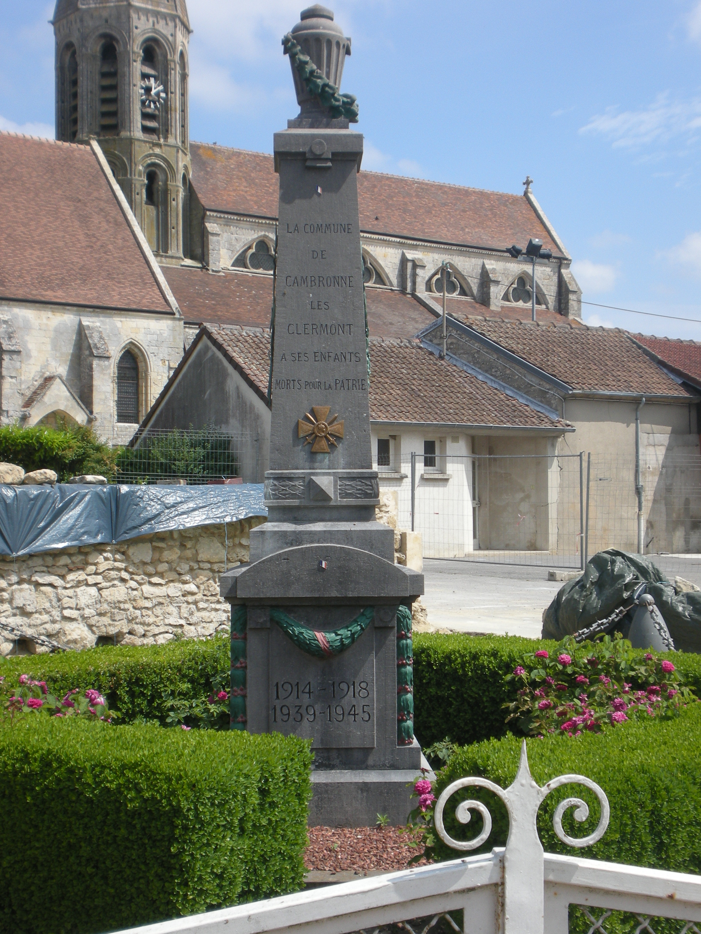 Monument aux morts de Cambronne-les-Clermont